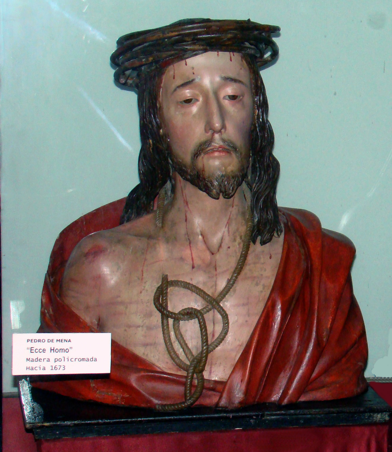 Ecce Homo talla policromada de Pedro de Mena, Museo catedralicio de Valladolid.